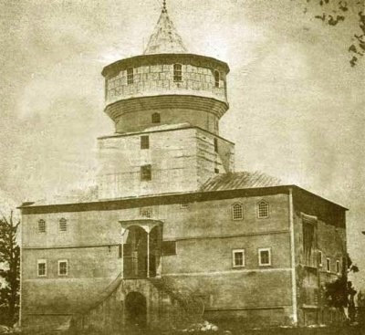 Cihannüma kasrı in Edirne, gebaut von Mehmed II. nach 1451 als Teil seines Palastes. 1878 zerstört. Photo vor 1878.